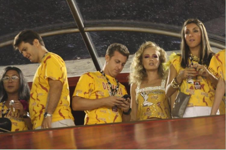 Angélica e Luciano Huck assistem as desfiles das escolas de samba no Rio de Janeiro.